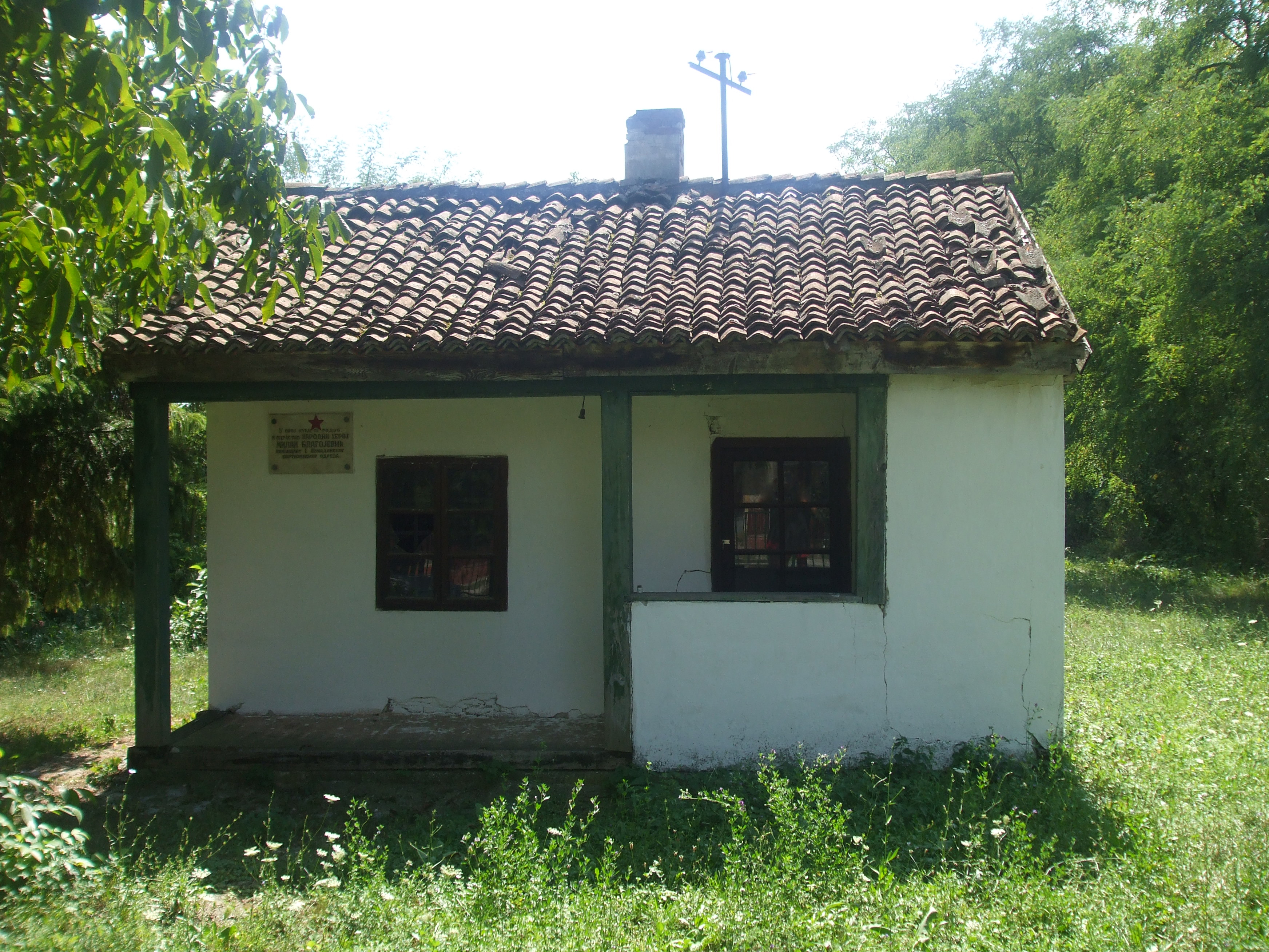 Родна кућа Милана Благојевића у Наталинцима.